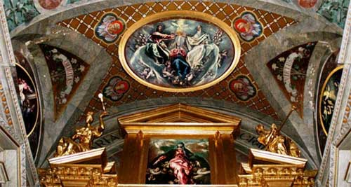 És una reconstrucció de dues obres originàries d'El Greco. Una d'elles està actualmente en un retaule lateral, i l'altre a la Sacristia, de l'Església de l'Hospital de la Caritat d'Illescas (Toledo)